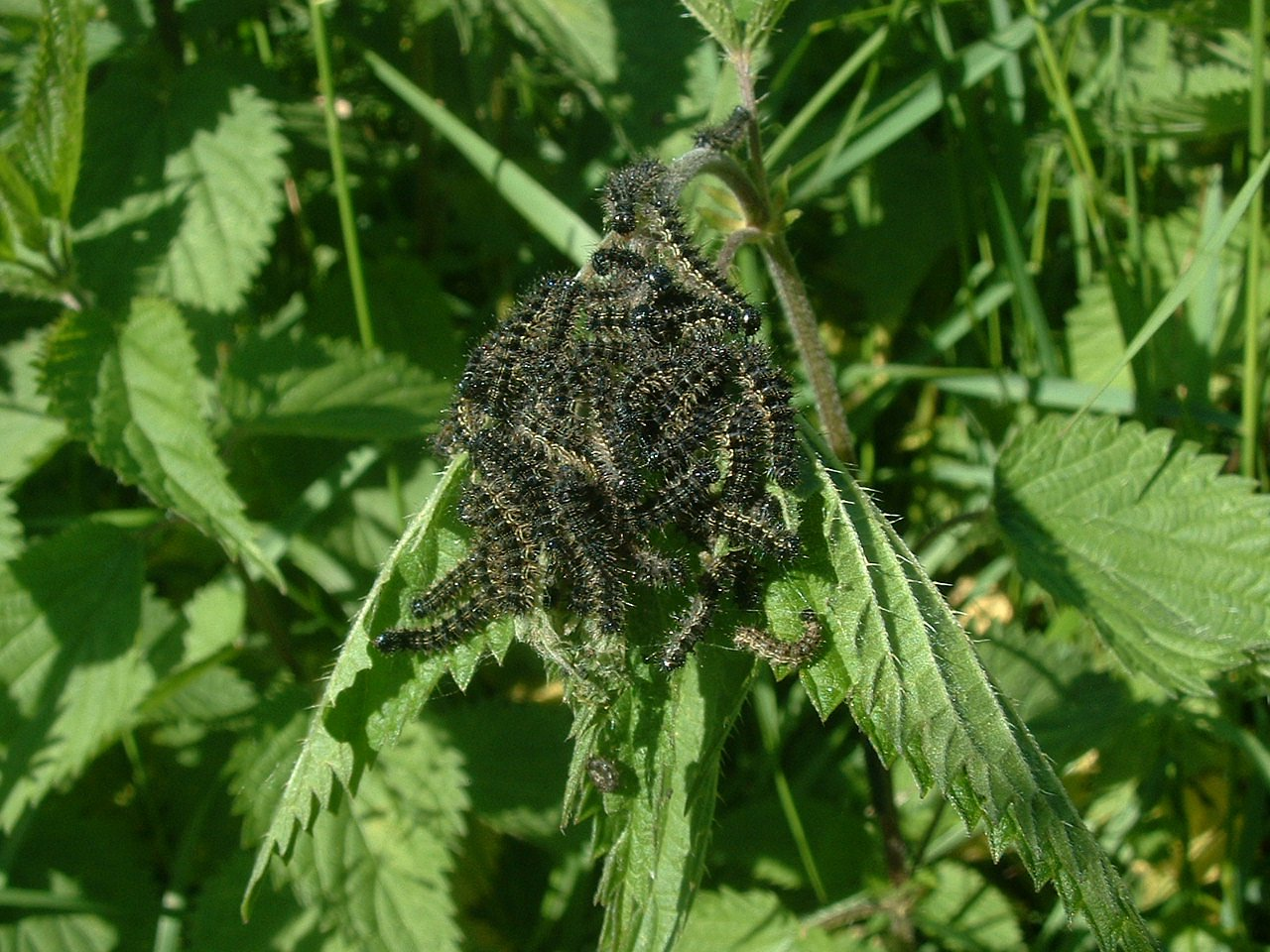 Aglais urticae photo by Jeffdelonge Vantoux juin 2006